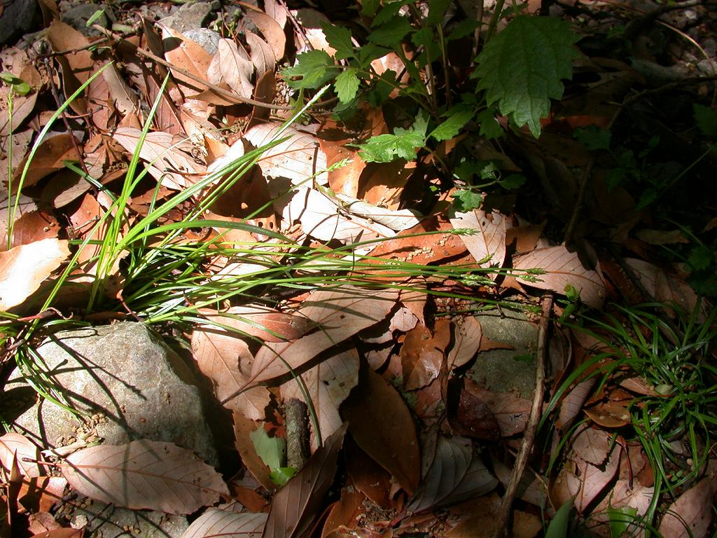 Carex rhizopoda (Cyperaceae) シラコスゲ ２００４年５月８日和歌山県田辺市